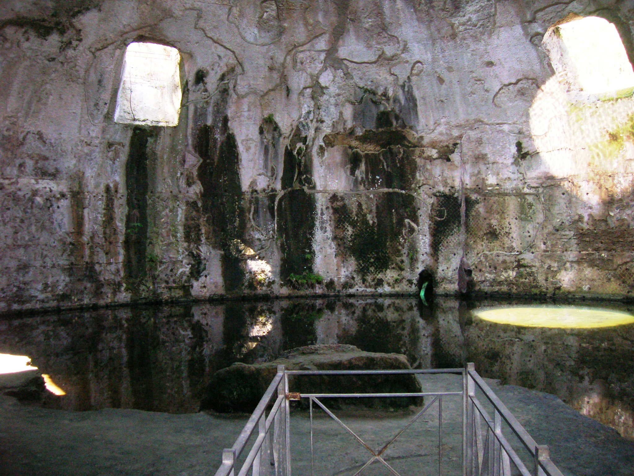 Il cosiddetto tempio di Mercurio a Baia